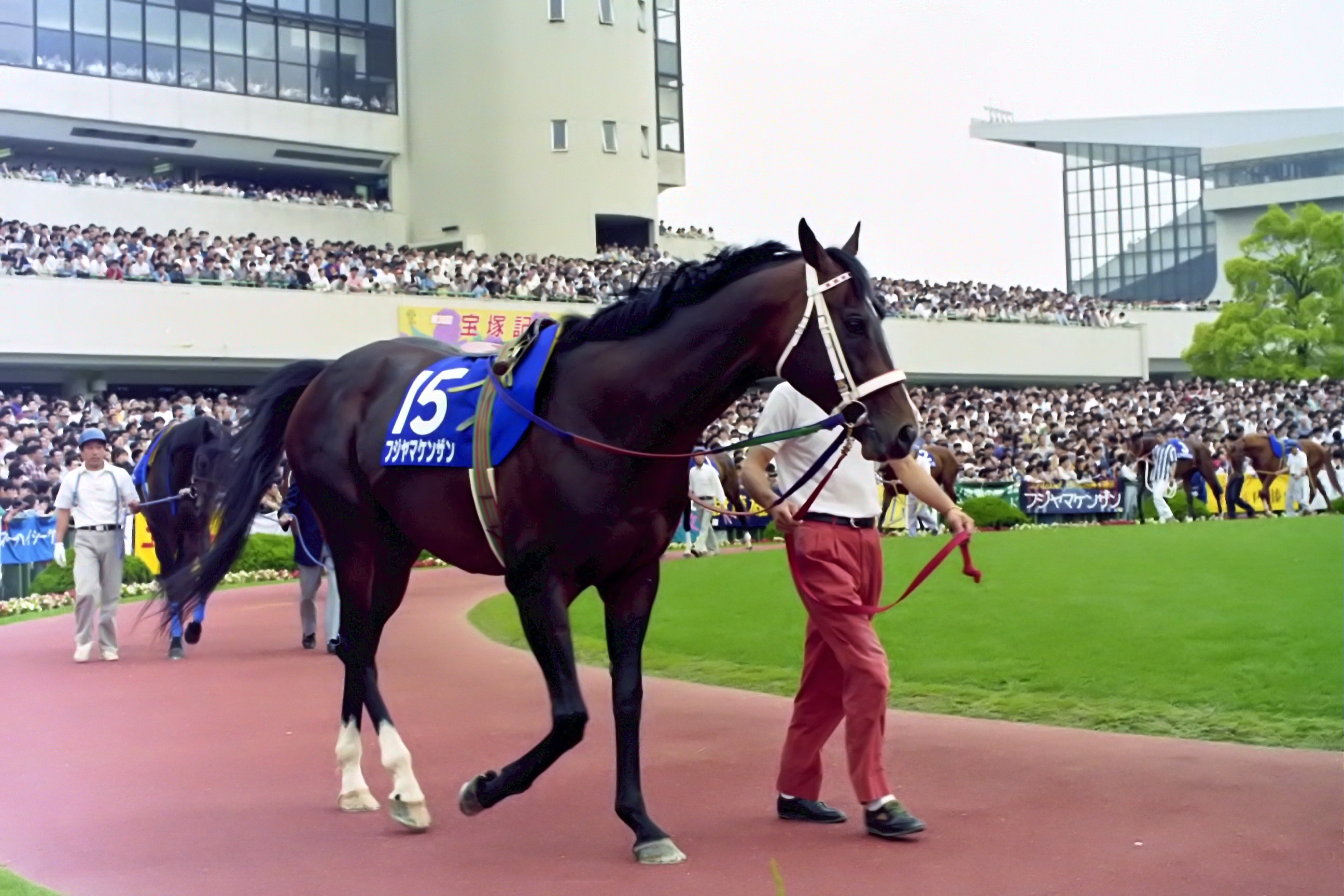 フジヤマケンザン 1995年6月4日 京都競馬場